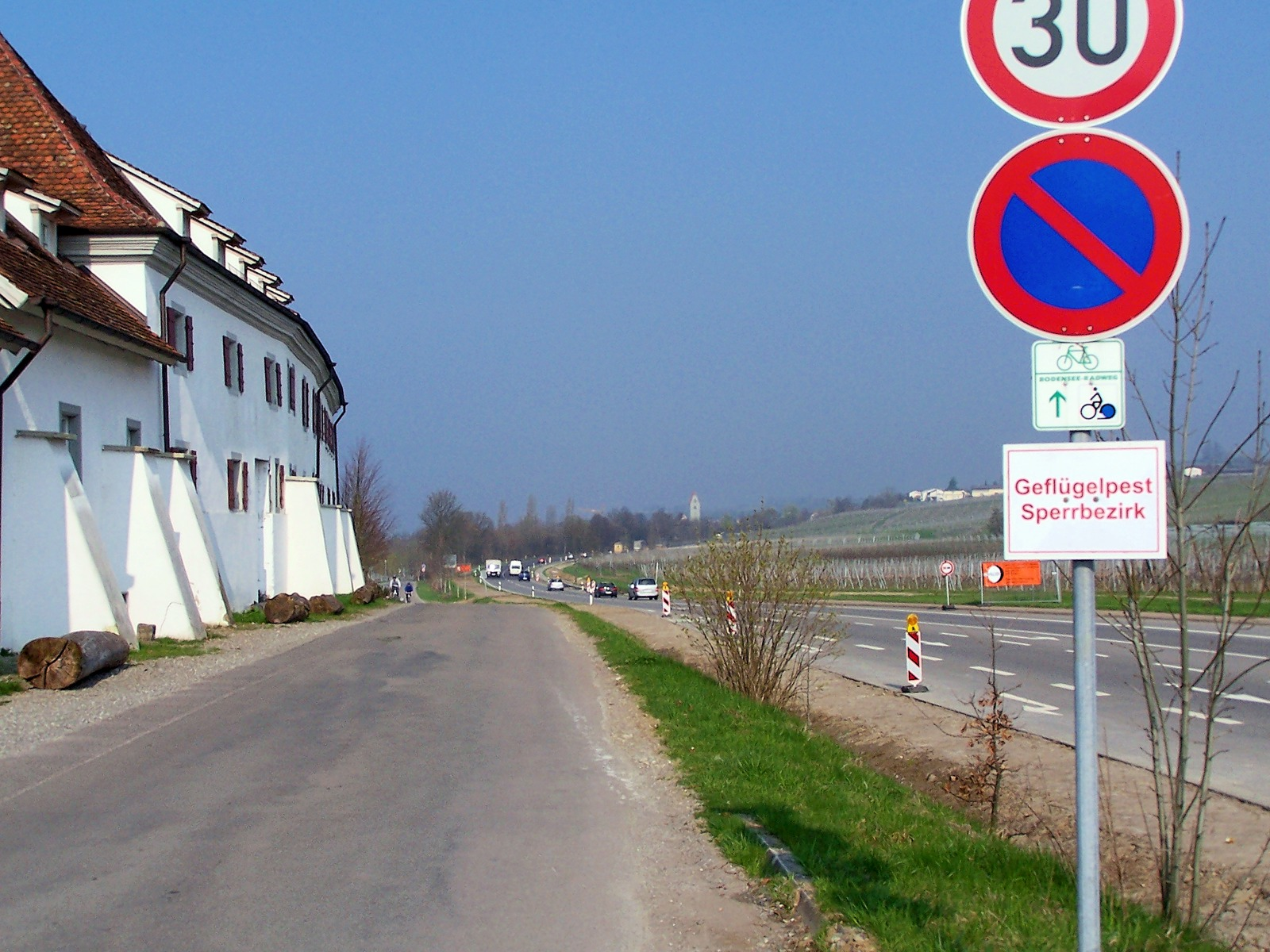 Teilstück Bodenseeradweg